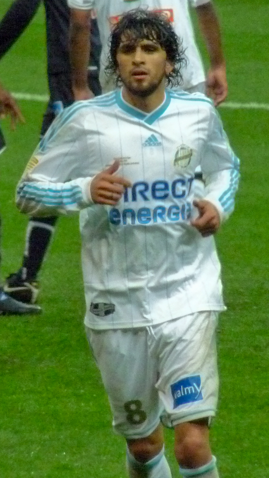 Finale de la coupe de la ligue - OM vs Bordeaux 3-1 - Stade de France - 27 mars 2010